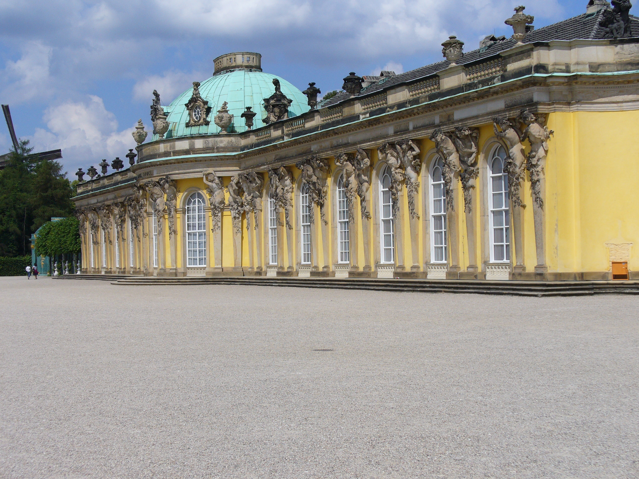 Schloß Sanssouci(frz.sans souci = ohne Sorge) 1745-1747